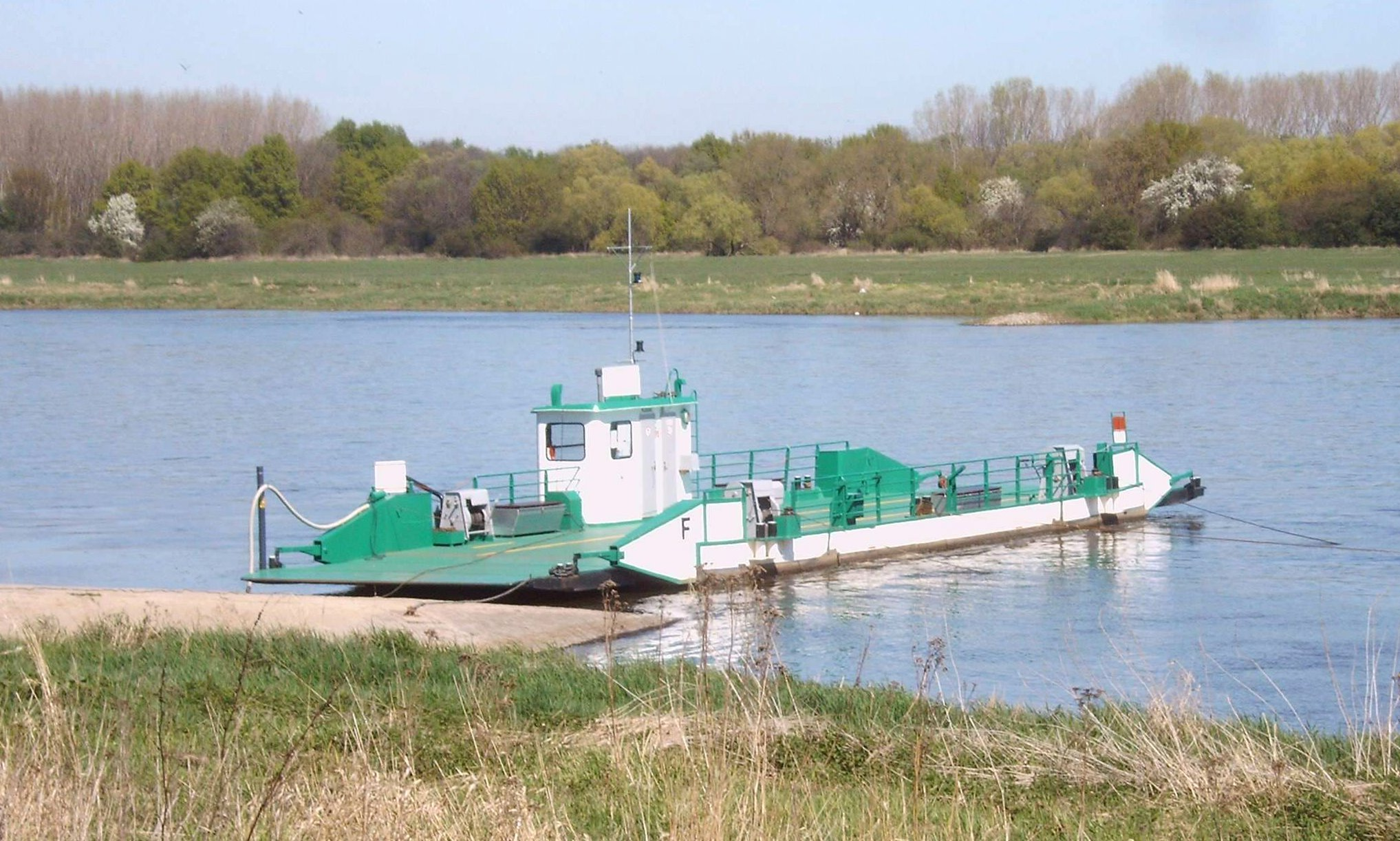 Gierfähre über die Elbe in Westerhüsen, Magdeburg, Sachsen-Anhalt. Am gegenüberliegenden Elbufer der Stadtteil Randau-Calenberge.